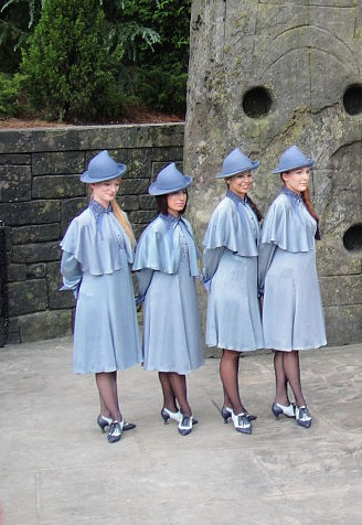 Costumes de l'Académie Beauxbâtons, arborés lors d'une représentation au "Wizarding World of Harry Potter"